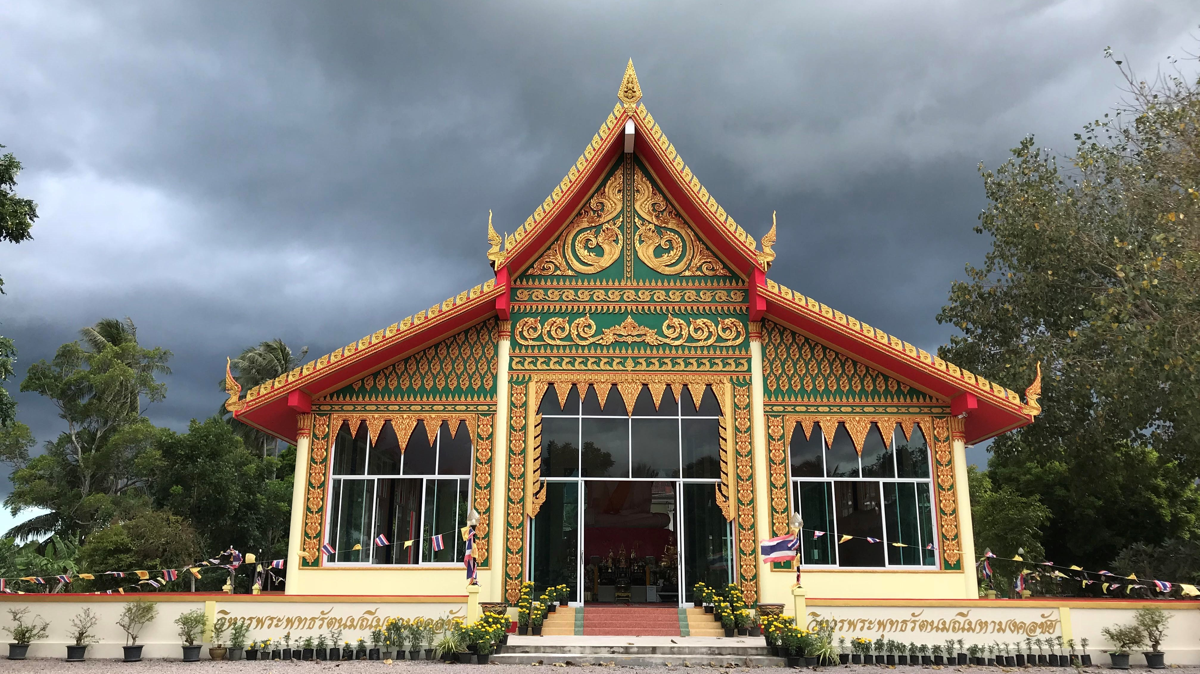 วิหารพระพุทธรัตน์มณีมหามาคลชัย